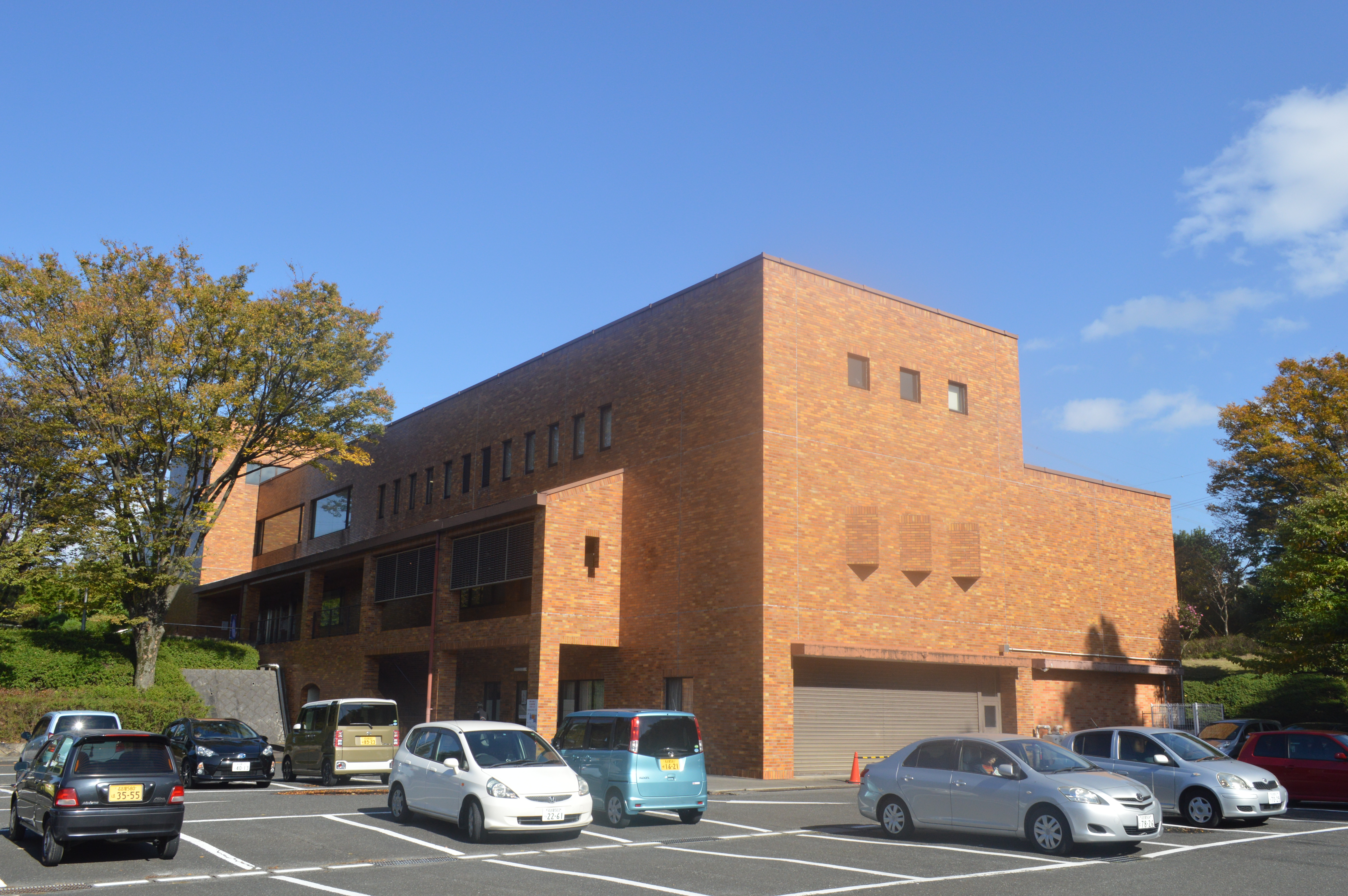 愛知県知多市にある知多市立中央図書館。